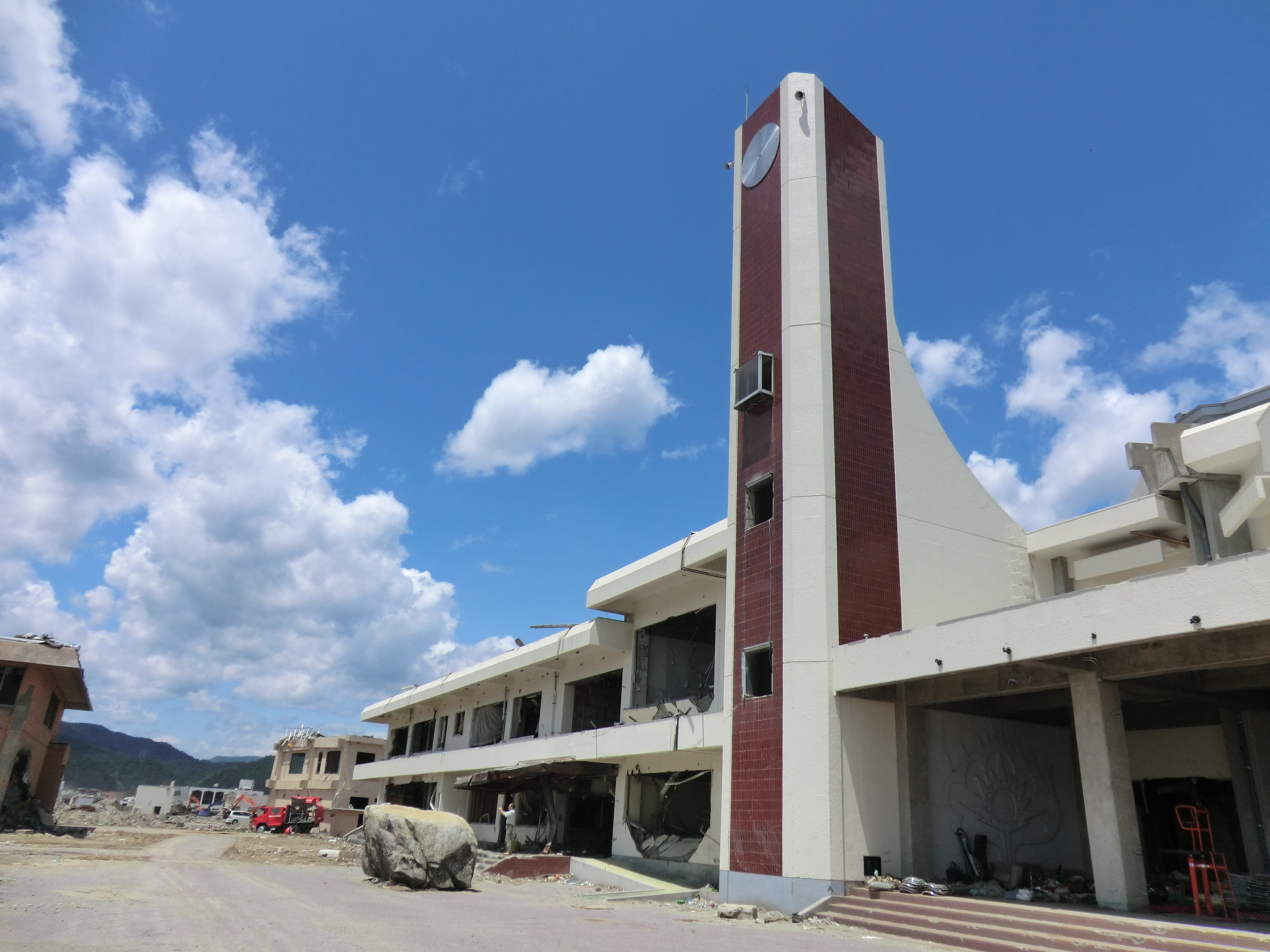 陸前高田市民体育館・中央公民館の時計塔